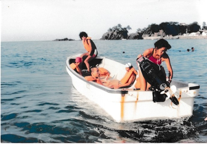 船外機付き和船で遊覧プログラムの様子。